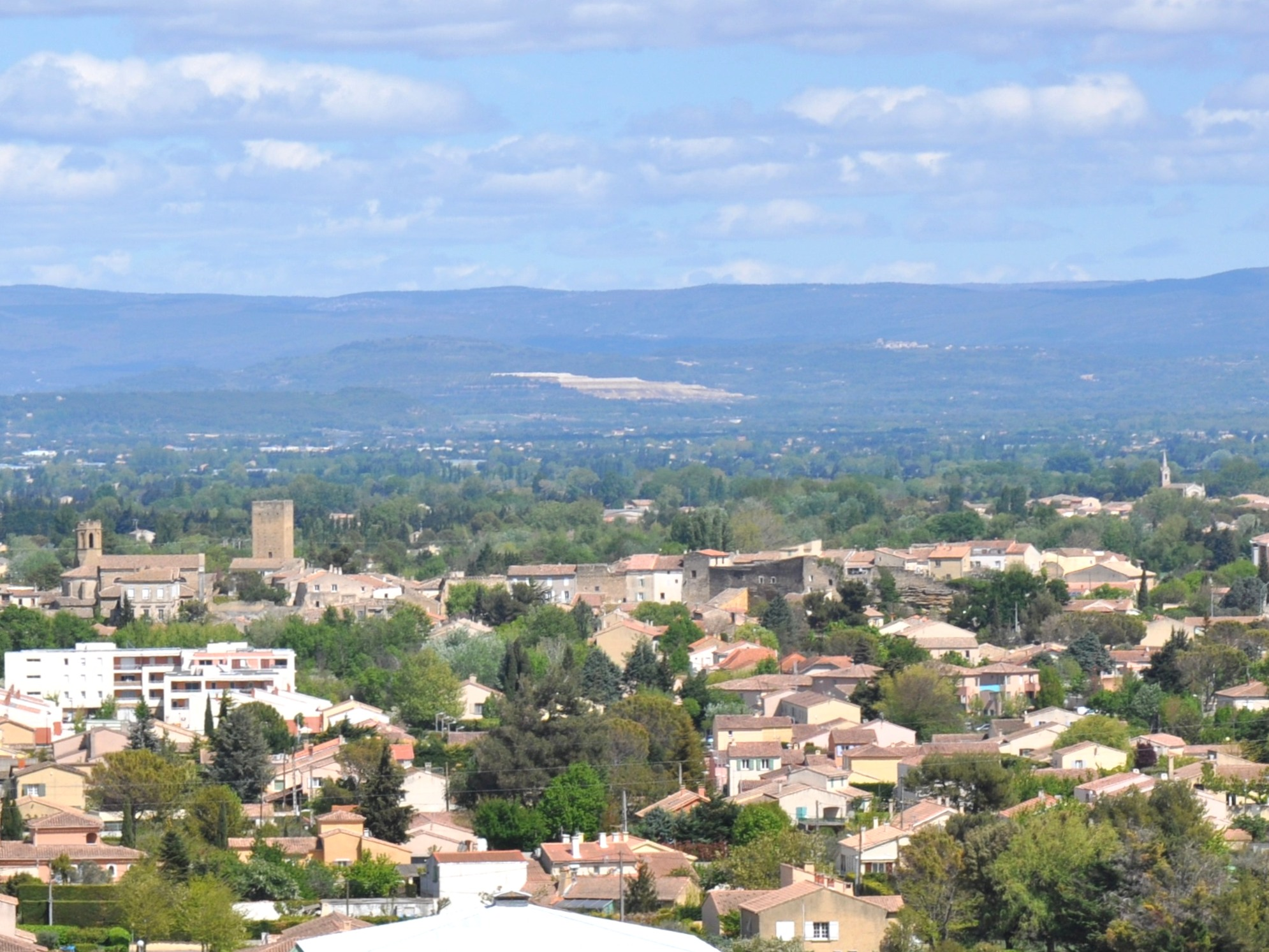 Vue du centre village Entraigues 84 320